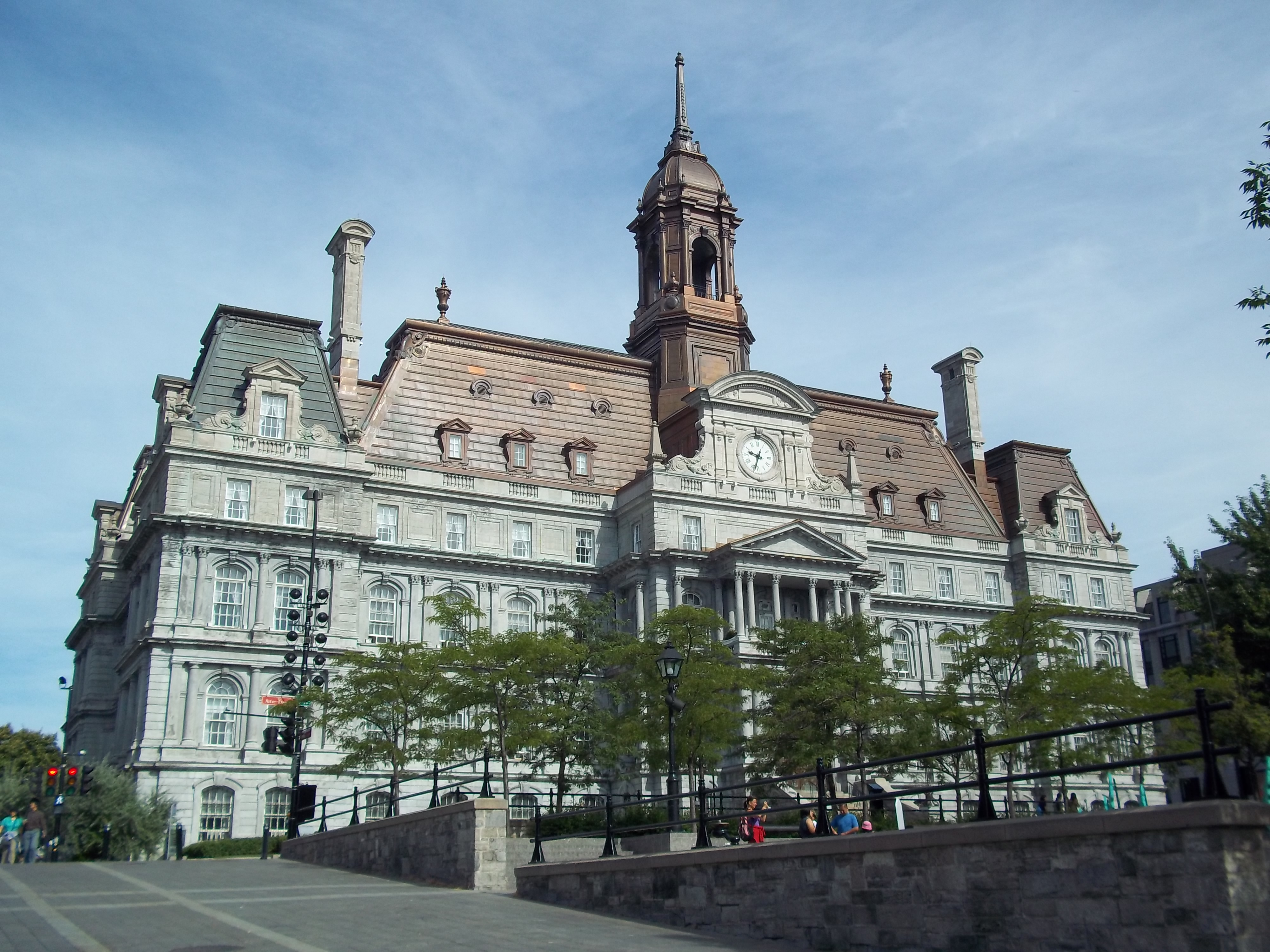 Hôtel de ville de Montréal